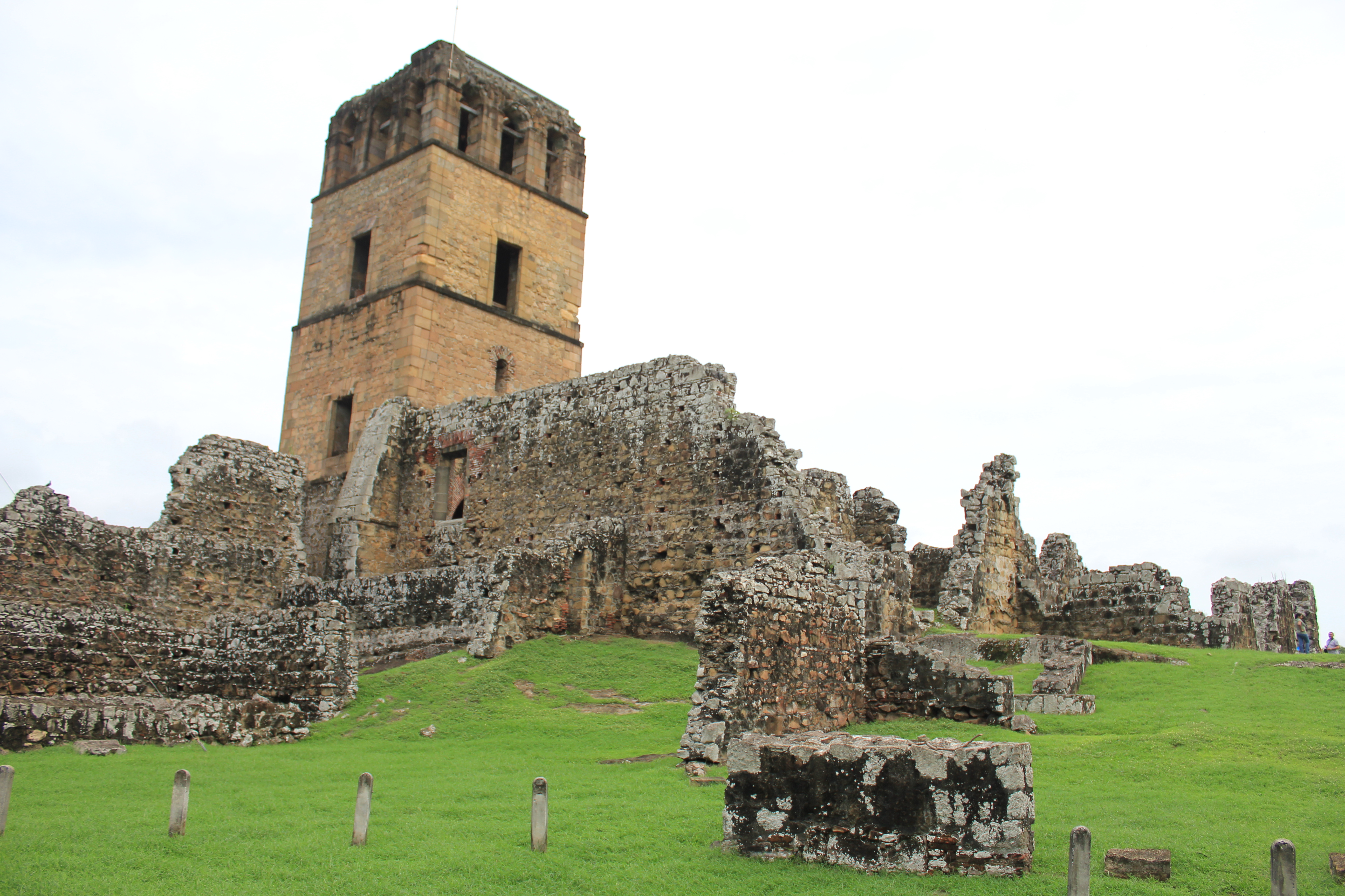 Conjunto Monumental Histórico de Panamá Viejo, Panamá. Declarado Patrimonio de la Humanidad por UNESCO.